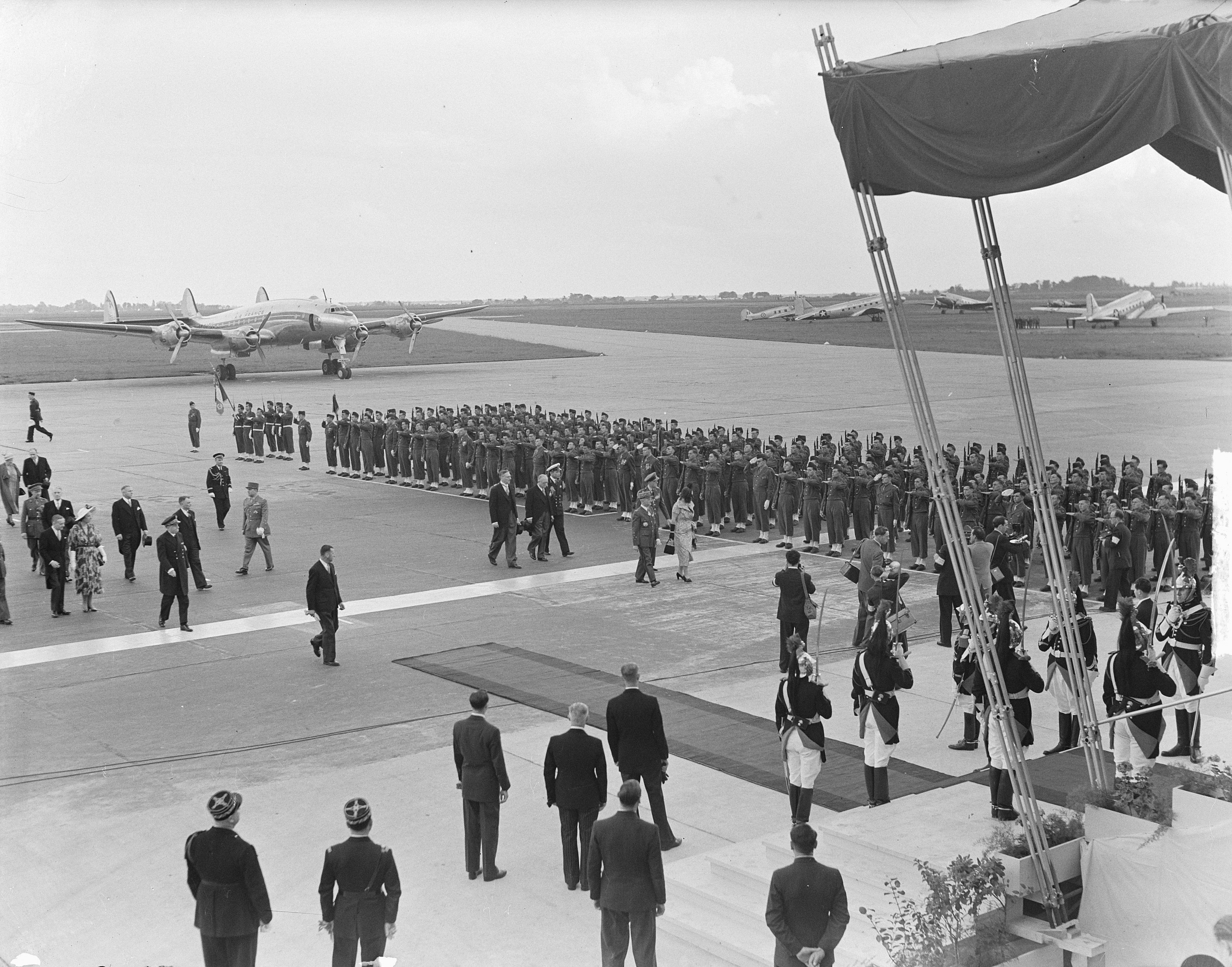 Collectie / Archief : Fotocollectie Anefo Reportage / Serie : [ onbekend ] Beschrijving : Koninklijk bezoek aan Parijs, Aankomst koningin Juliana op vliegveld Parijs Datum : 23 mei 1950 Locatie : Frankrijk, Parijs Trefwoorden : koninginnen, presidenten, staatsbezoeken, vliegvelden Persoonsnaam : Auriol, Vincent, Juliana (koningin Nederland), Juliana, koningin Fotograaf : Noske, J.D. / Anefo Auteursrechthebbende : Nationaal Archief Materiaalsoort : Glasnegatief Nummer archiefinventaris : bekijk toegang 2.24.01.09 Bestanddeelnummer : 903-9779